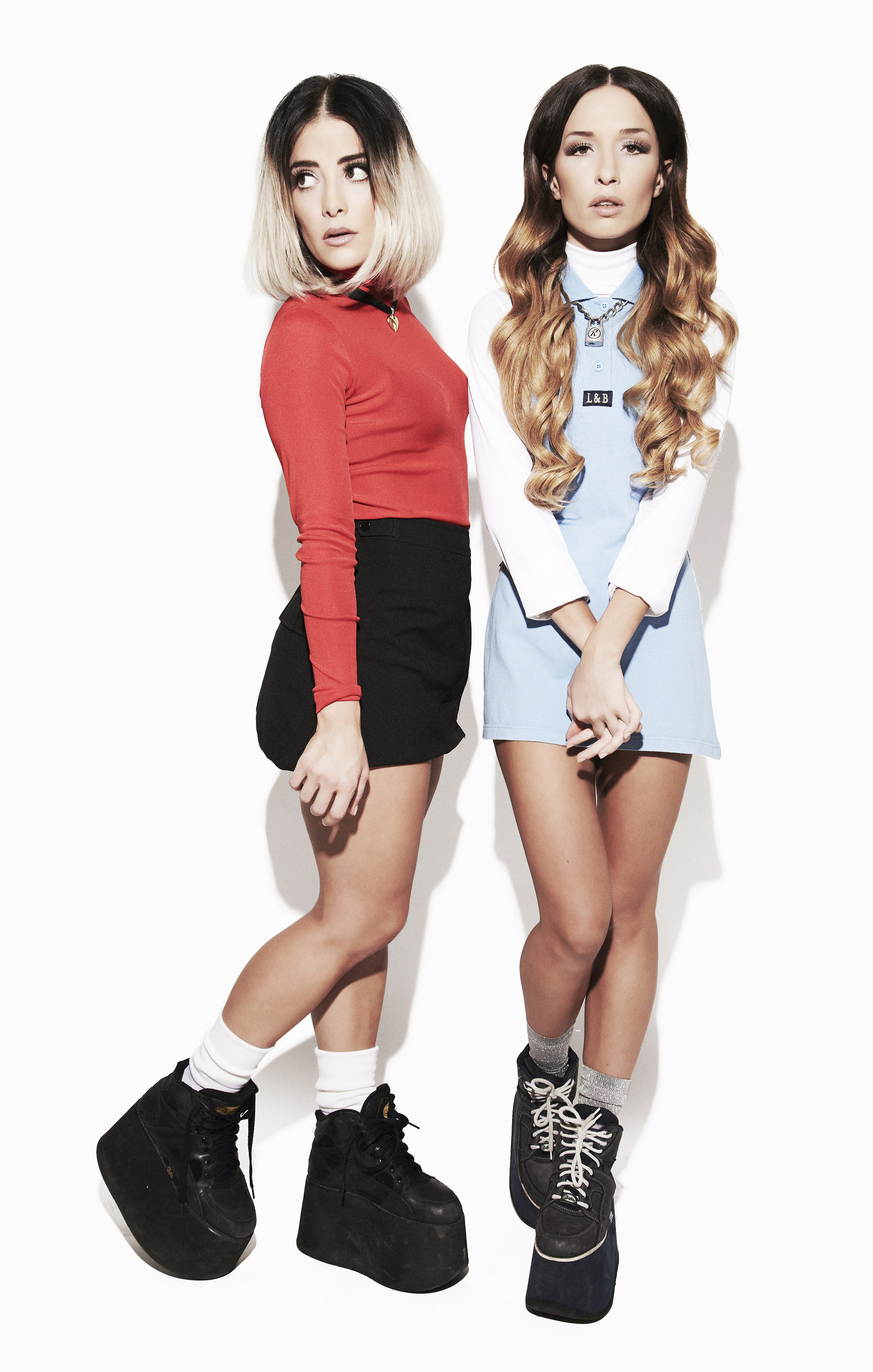 Rebecca & Fiona, 2011